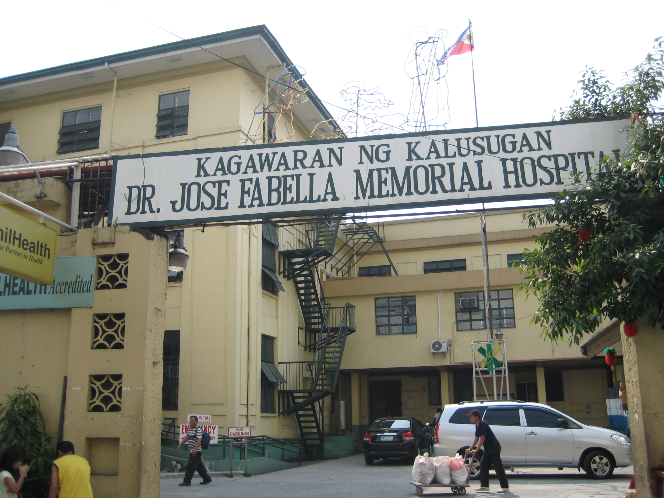 Dr. Jose Fabella Memorial Hospital in Manila, Philippines